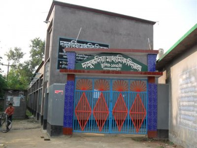 দামুকদিয়া মাধ্যমিক বিদ্যালয়